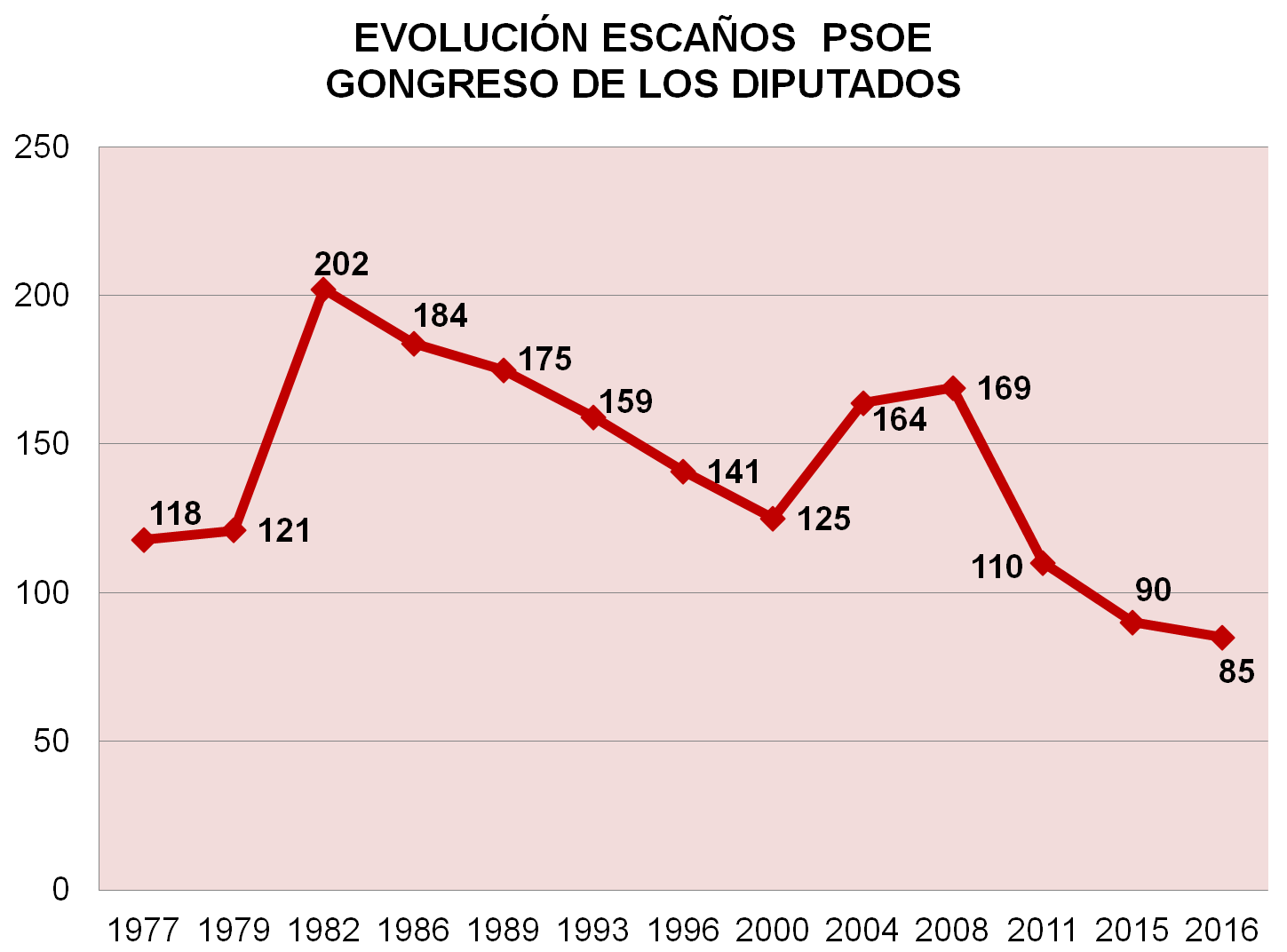 Evolución de los escaños del Partido Socialista Obrero Español (PSOE) en el congreso de los diputados desde 1977